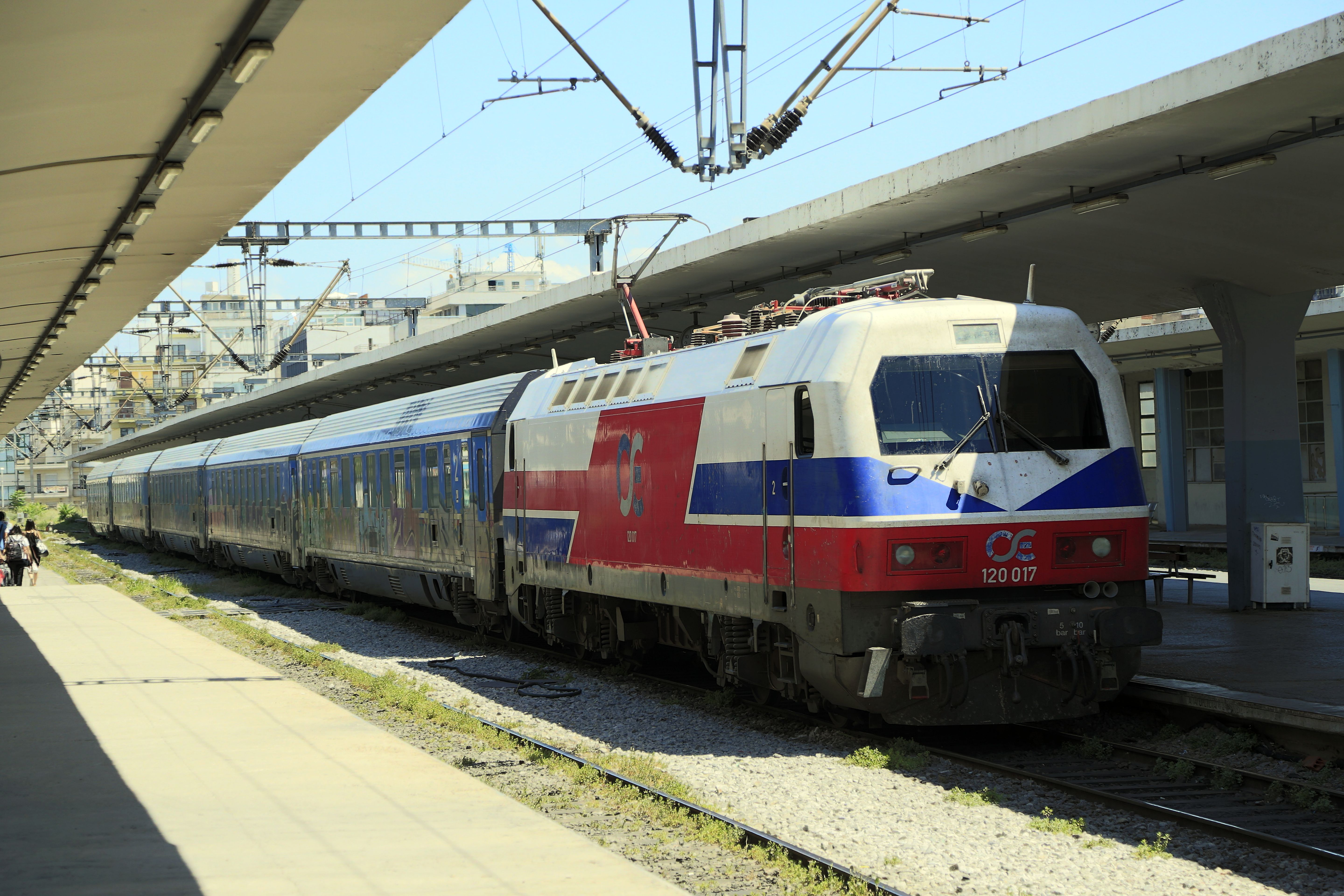 Schnellzug Thessaloníki–Athína nach der Bereitstellung. Die Züge stehen ungewöhnlich lange am Bahnsteig. HDR